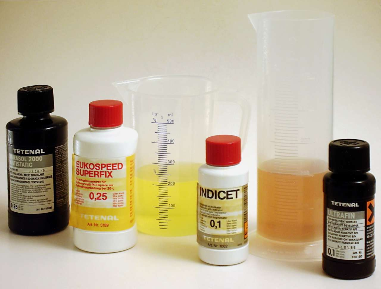 Agfa Rondinax 35 U / Die im Beispiel verwendeten Chemikalien von Tetenal- Agfa Rondinax 35 U / Developing agents made by Tetenal.